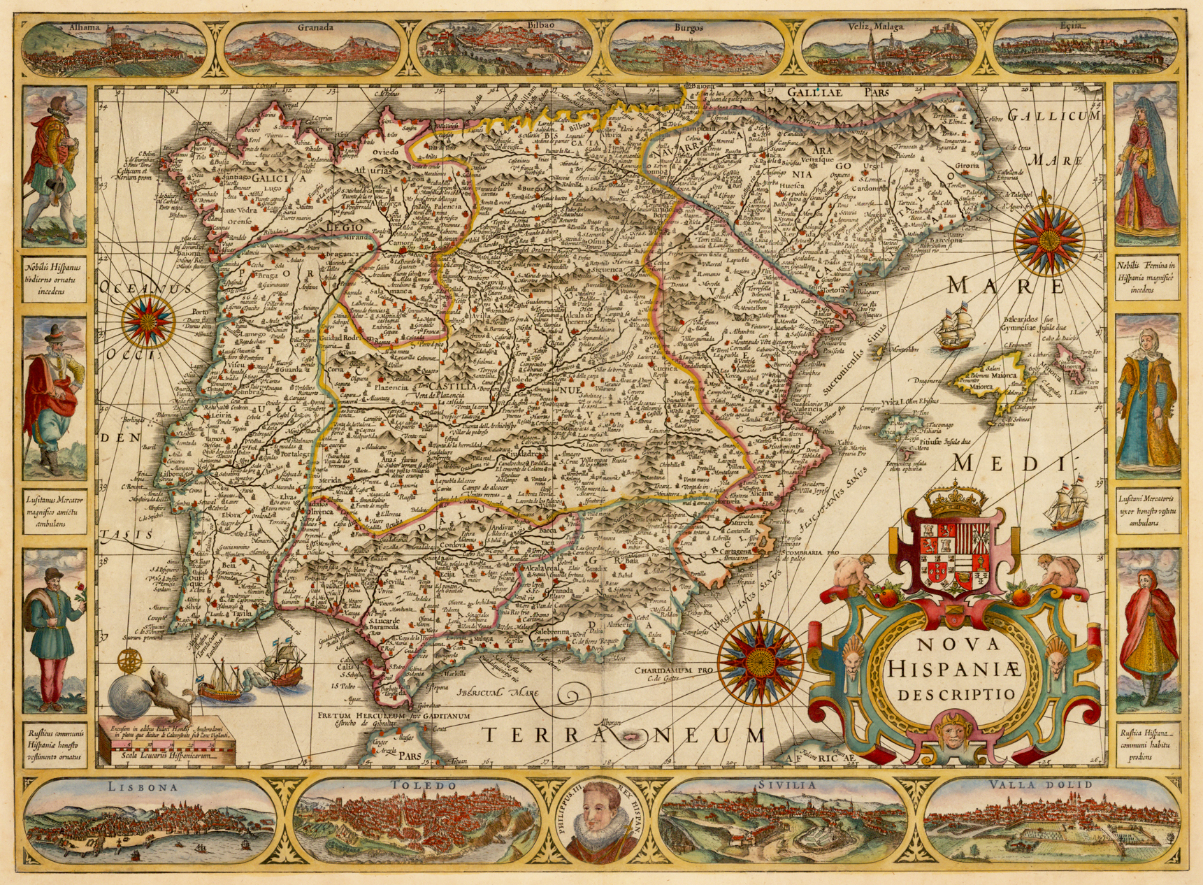 Orientado con rosas con lis. Nudos de rumbos. - Márgenes graduados. Dibujados meridianos y paralelos formando cuadrícula. - Relieve por montes de perfil y sombreado. - Red hidrográfica destacada. - Abundante toponimia. - Divisiones administrativas diferenciadas por color. - Poblaciones representadas por conjuntos de edificaciones según su importancia. - Costas sombreadas con un fino rayado. El mapa no está datado pero se puede fechar hacia 1610 teniendo en cuenta la presencia del retrato del rey Felipe III (1598 -1621) y el año del fallecimiento del autor (1612). En el ángulo inferior derecho, cartela renacentista coronada por el escudo del reino de España incluyendo Portugal, flanqueado por dos figuras masculinas sedentes y decoración de tres mascarones. En el ángulo inferior izquierdo se encuentra la escala en un pedestal que en su parte superior tiene el emblema de establecimiento editorial. En los laterales tres figuras femeninas y tres masculinas ataviadas con trajes de la época, correspondientes a diferentes estamentos sociales. En el margen inferior, dentro de un medallón aparece el retrato del monarca Felipe III, con la inscripción: "Philippus III Rex Hispan." En el mar embarcaciones de la época. En los márgenes superior e inferior incluye las vistas de la siguientes ciudades: "Alhama", "Granada", "Bilbao", "Burgos", "Veliz Malaga", "Eçija", "Lisbona", "Toledo" "Sivilia" y "Valladolid".